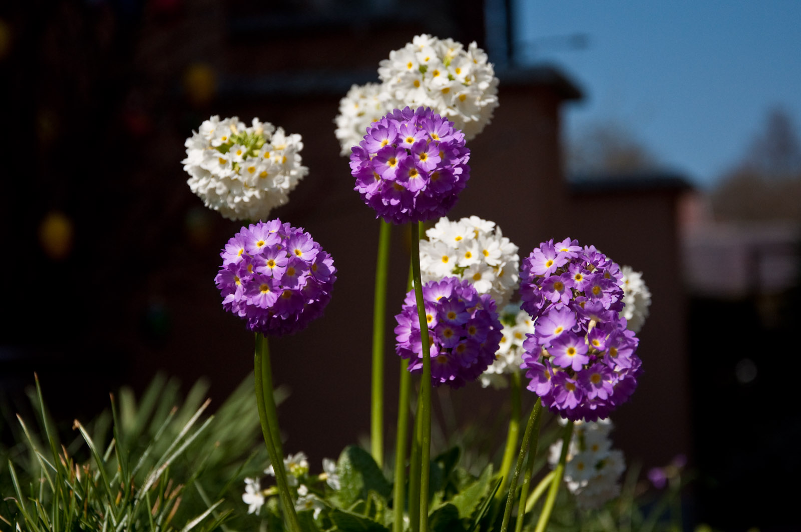 Foto von Thilo Langbein